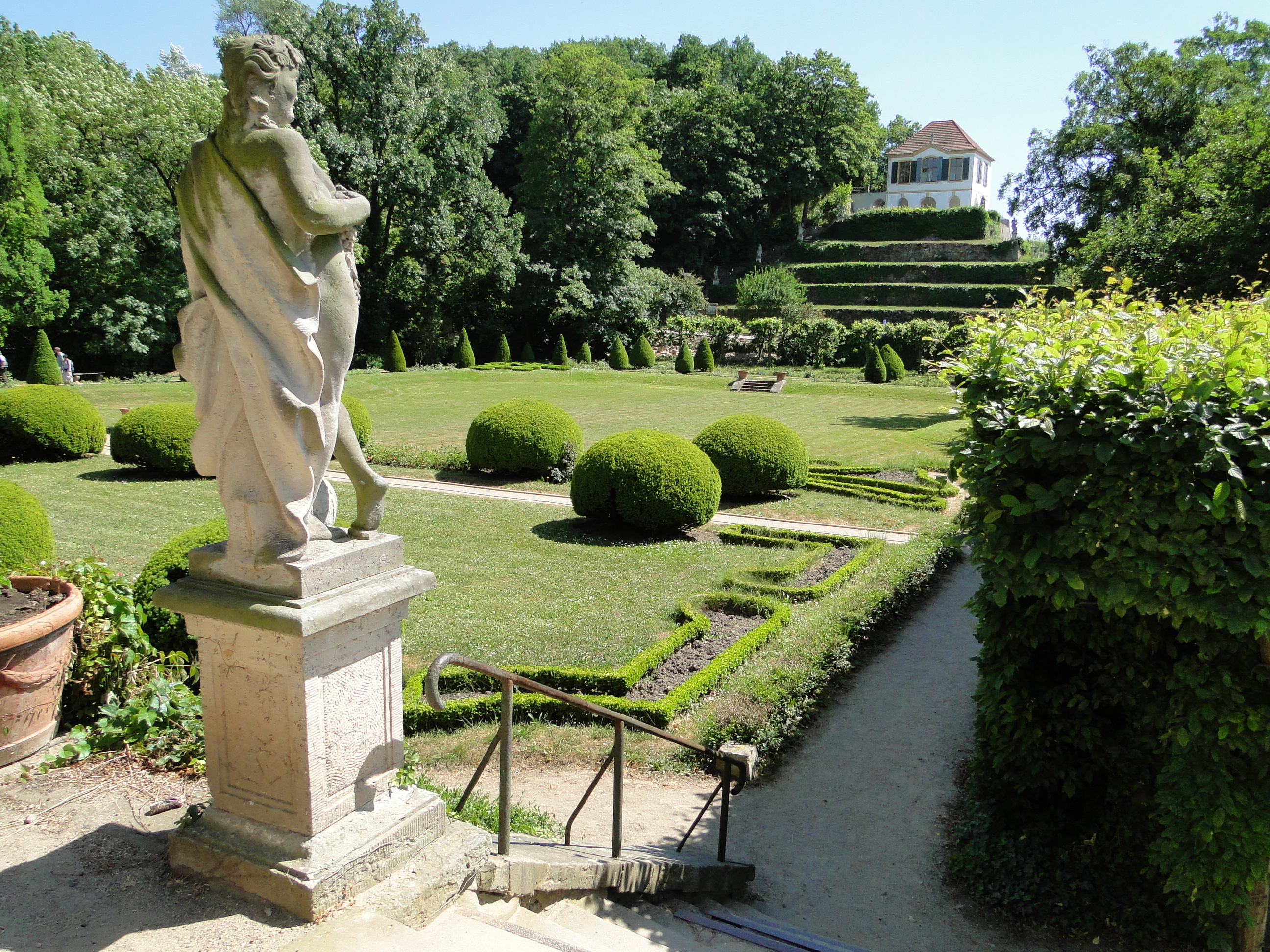 Kulturdenkmal Schloss Seußlitz Schlosspark